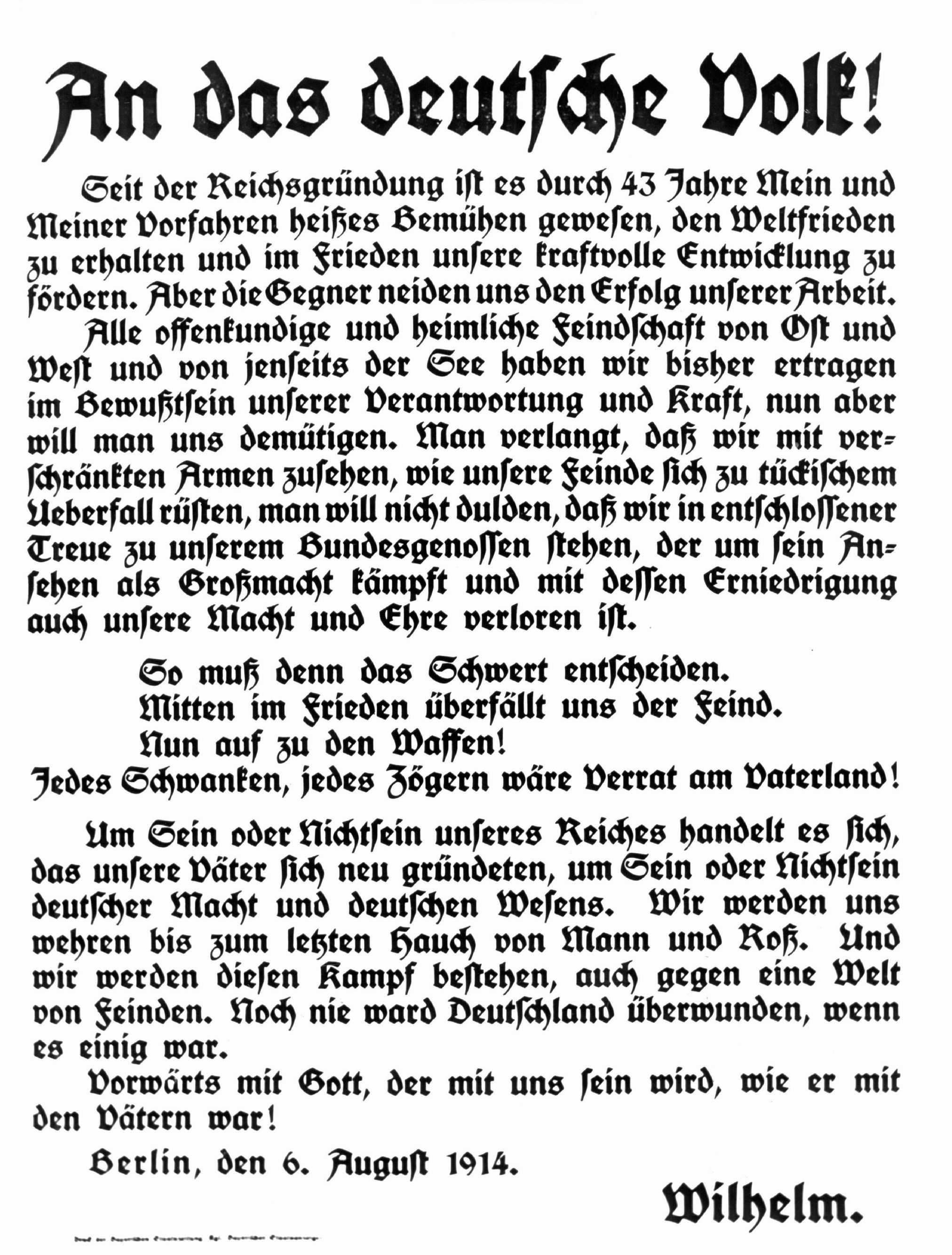 Text der Ansprache von Kaiser Wilhelm II "An das deutsche Volk" vom 4. August 1914.